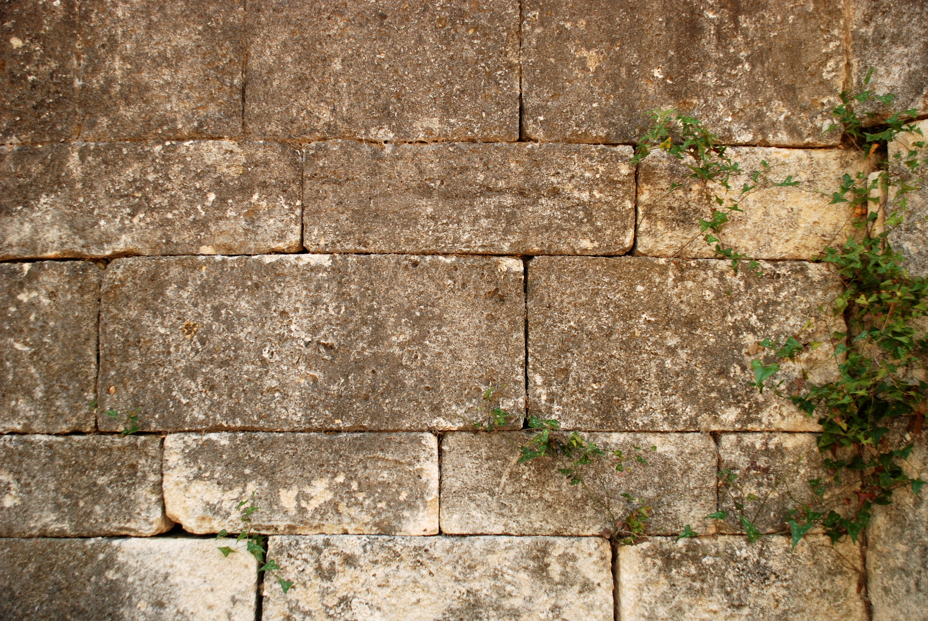 France - Hérault - Chapelle Notre-Dame-de-la-Pitié de Beaulieu